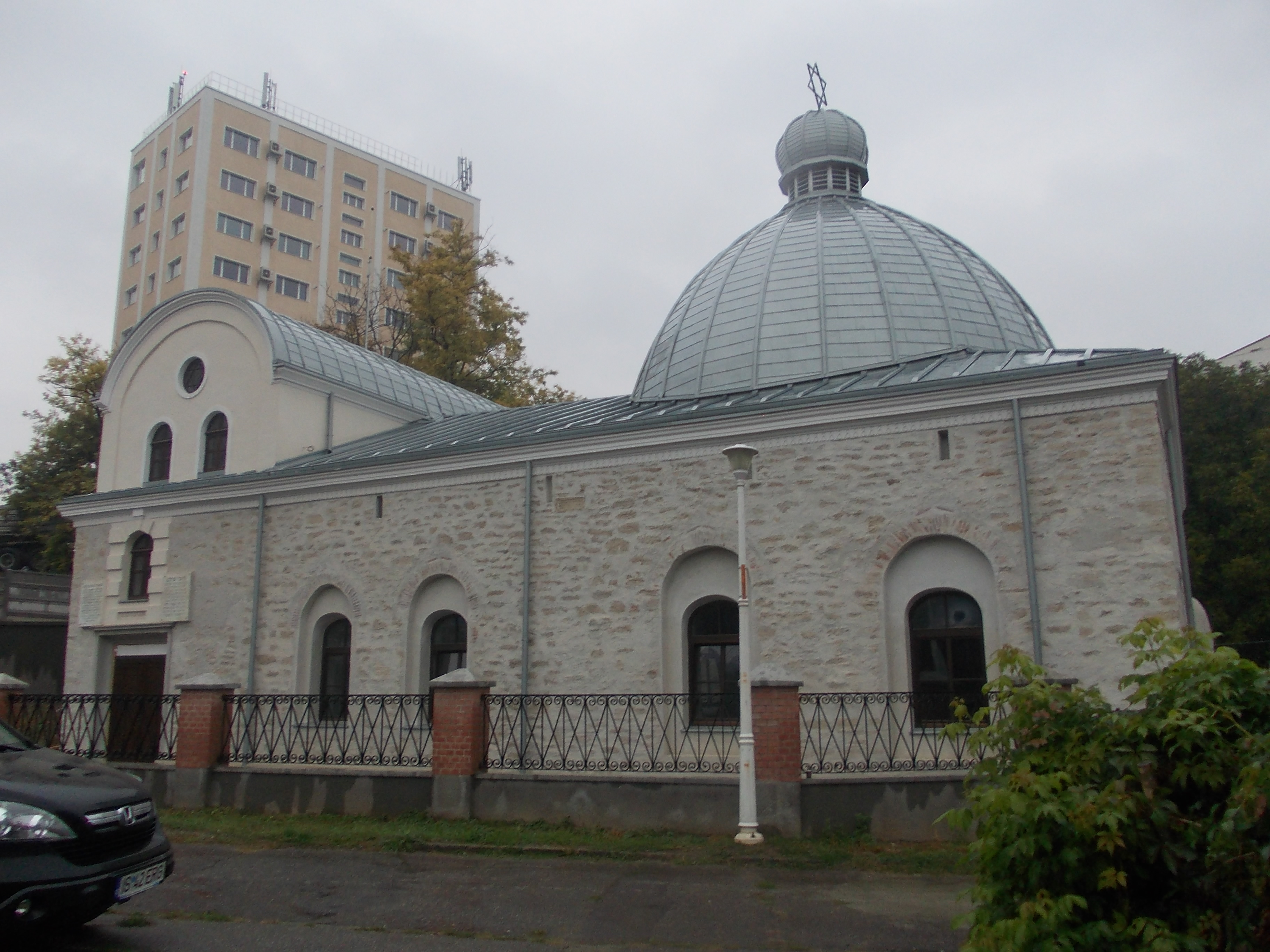 sinagoga veche din Iaşi